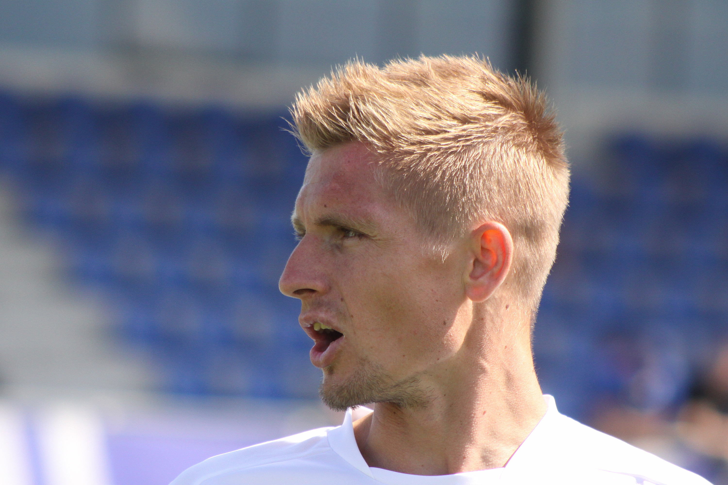 Artur Wichniarek – Hertha BSC Berlin (2)